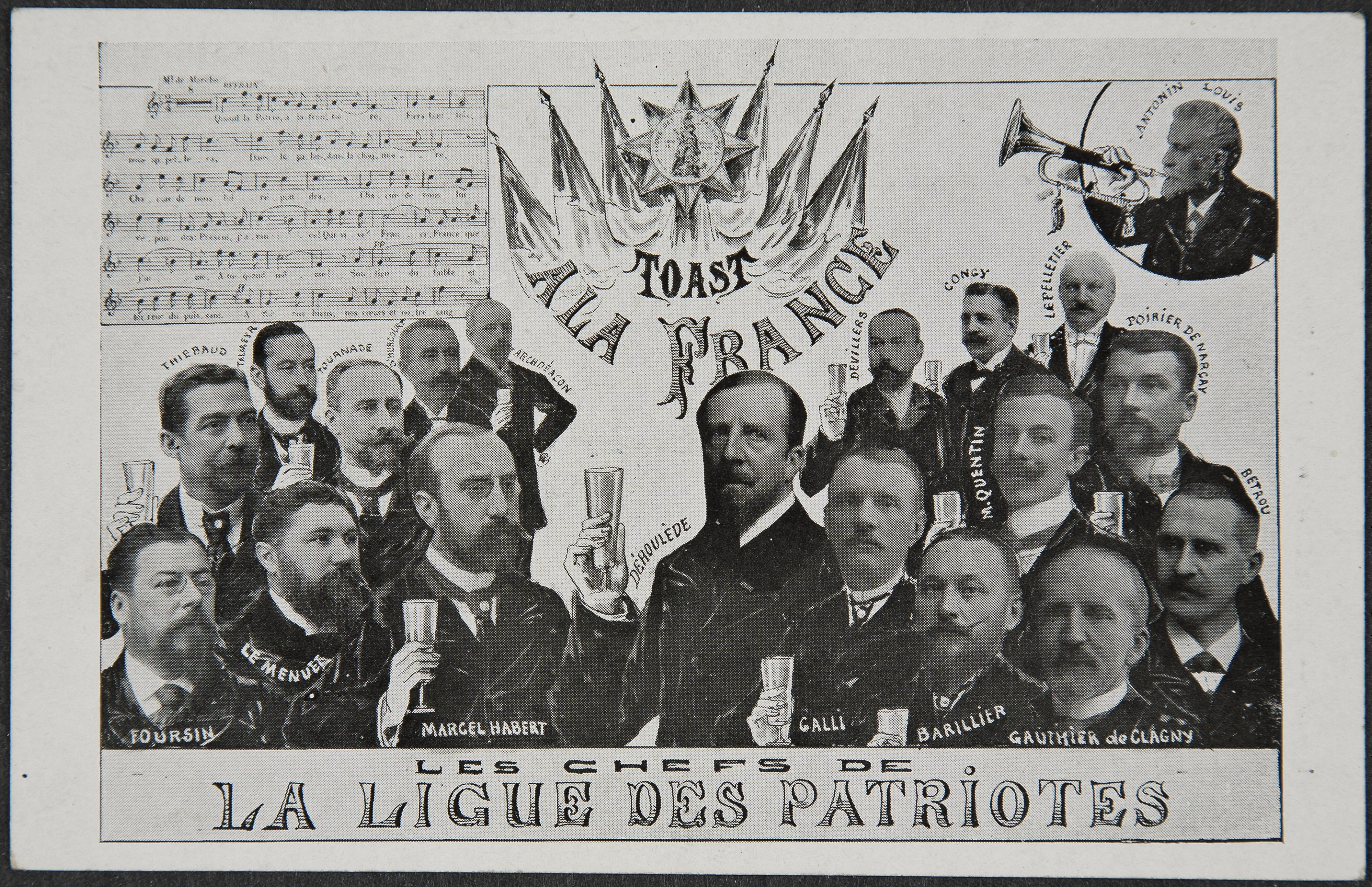 Carte postale avec un photomontage représentant les chefs de la Ligue des Patriotes.